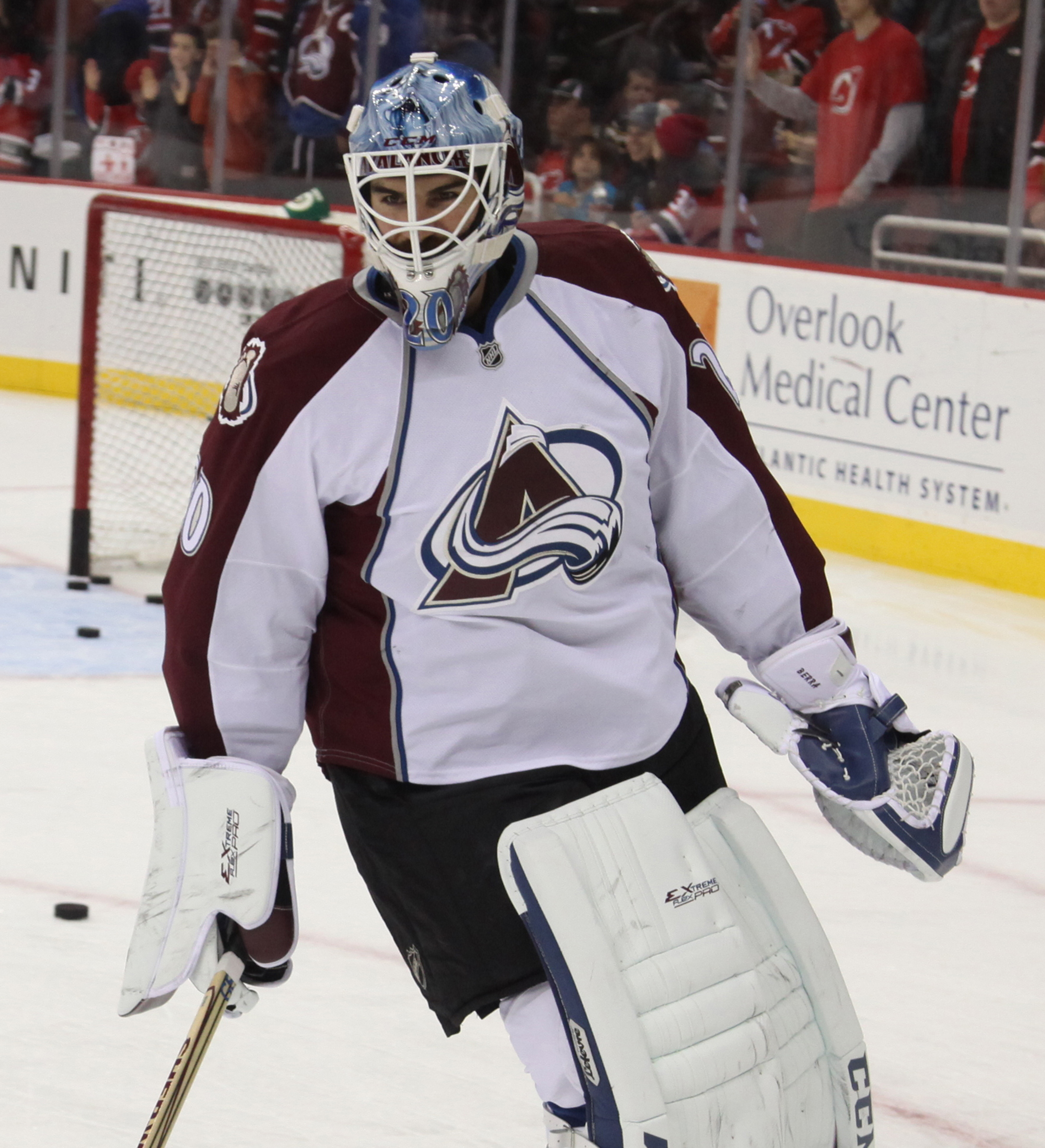 Berra in November 2014.